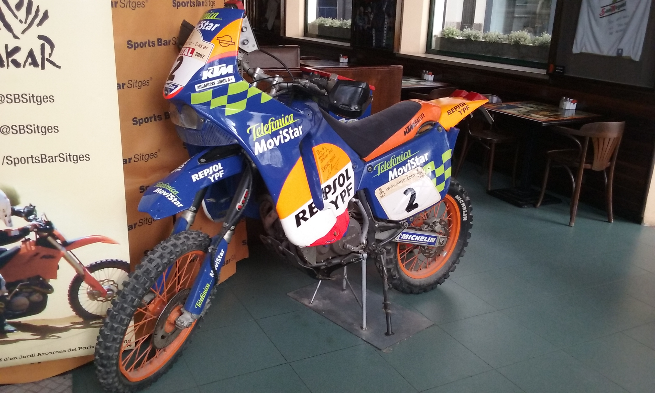 KTM de Jordi Arcarons al Rally Dakar 2002